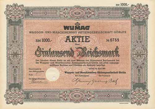 Aktie über 1000 RM der WUMAG mit Reichsbankschatz-Lochentwertung.